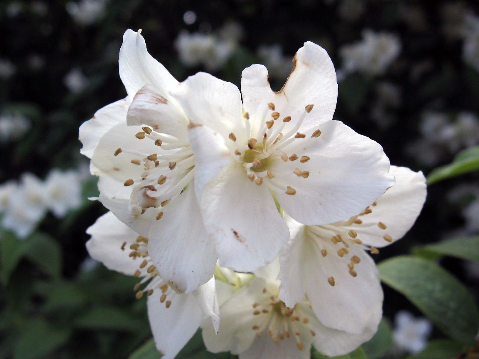 Harilik ebajasmiin Lld: Philadelphus coronarius